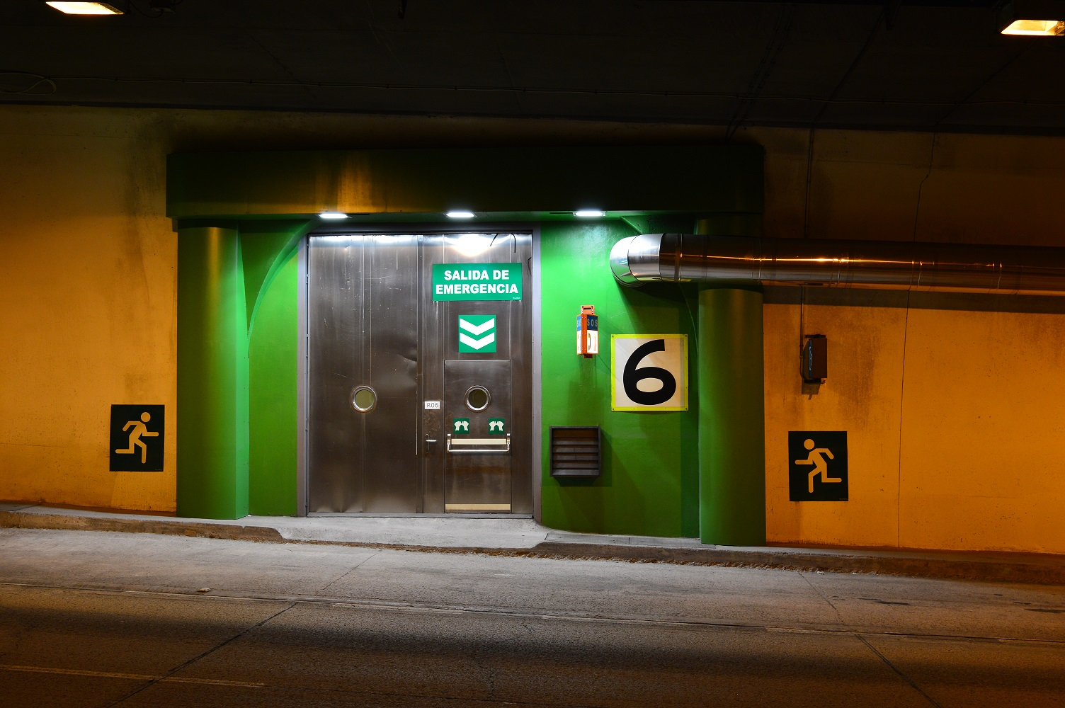 Galería de evacuación del Túnel de Vielha